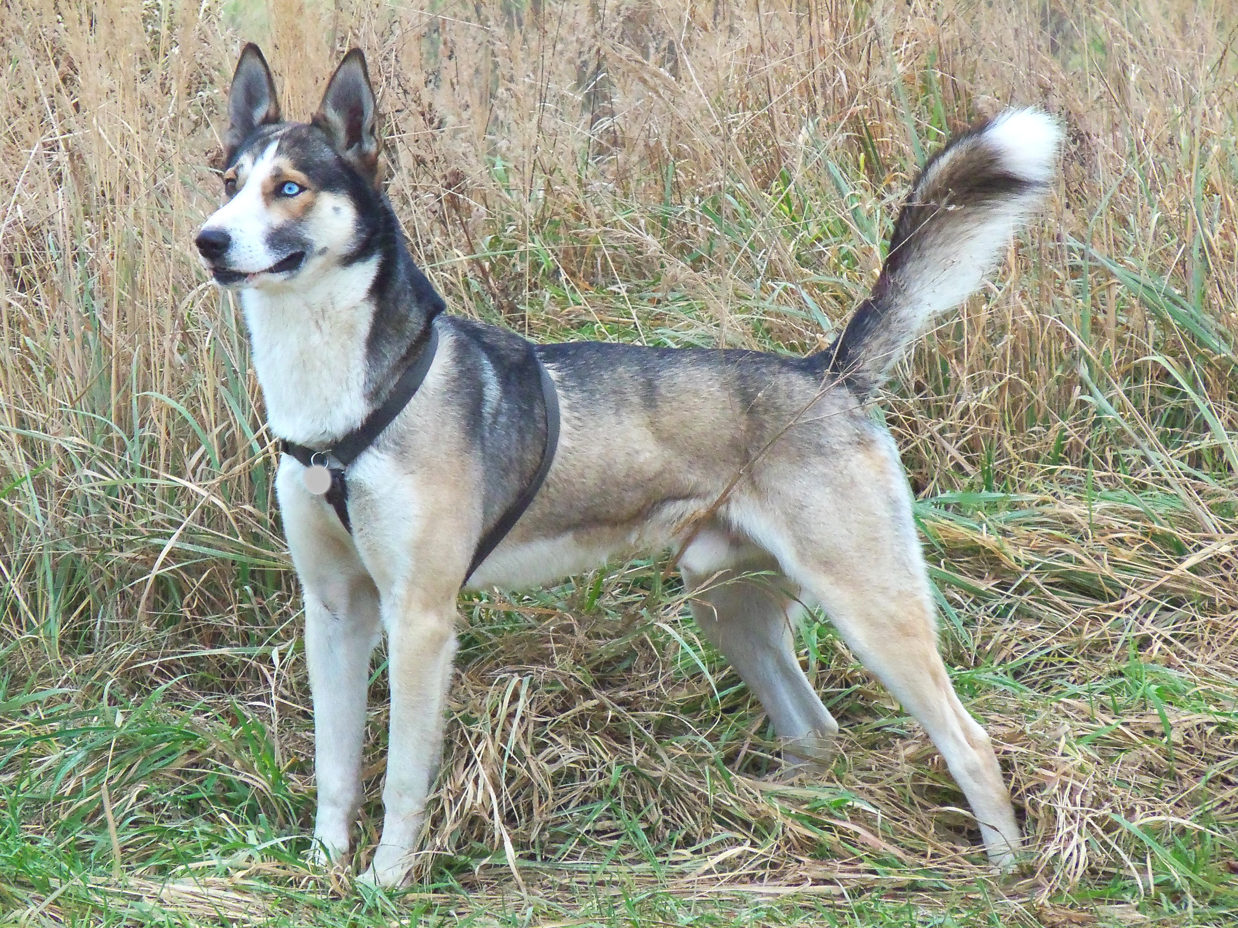 Alaskani jsou kříženci severských psů s jinými plemeny, aby dávali co nejvyšší výkony a byli odolní pro mushing